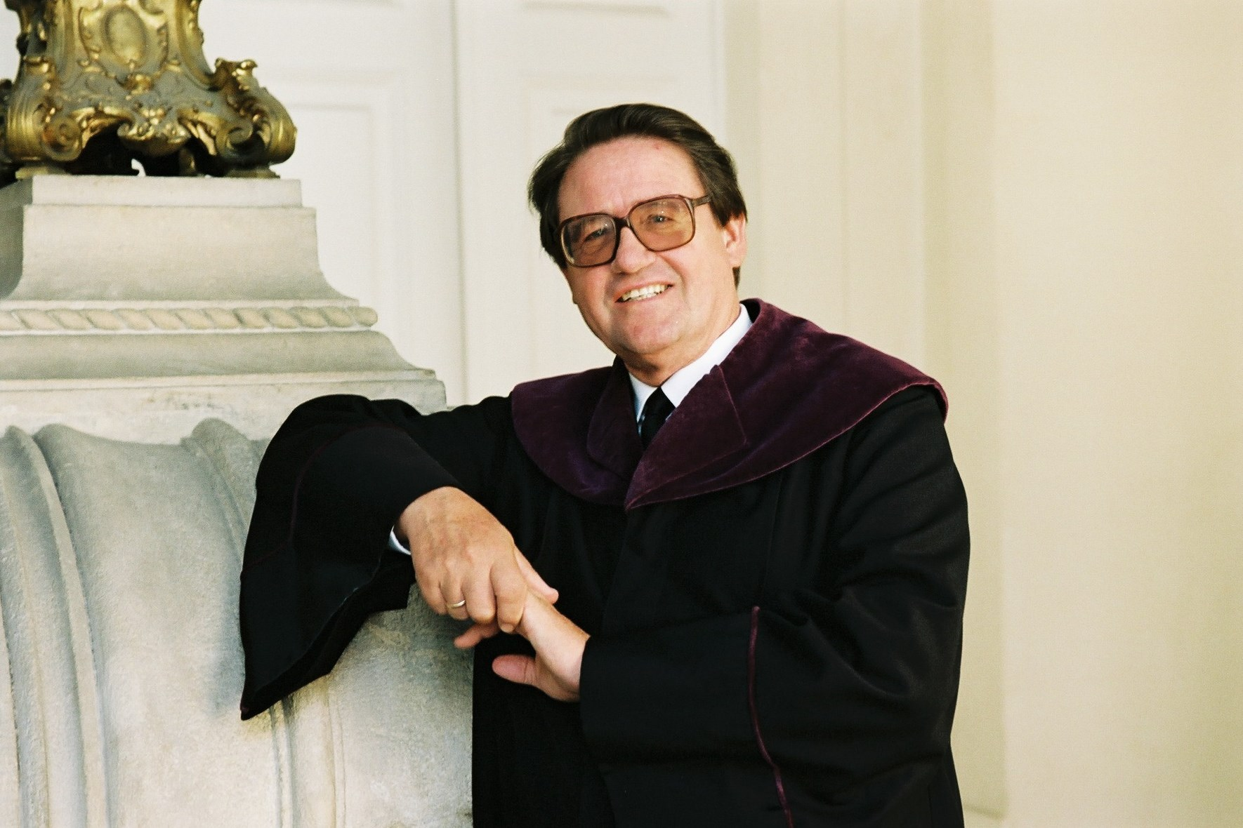 Dr. Karl Spielbüchler, Mitglied des österreichischen Verfassungsgerichtshofs von 1976 bis 2009. Hier auf einer Aufnahme des VfGH aus dem Jahr 2003.